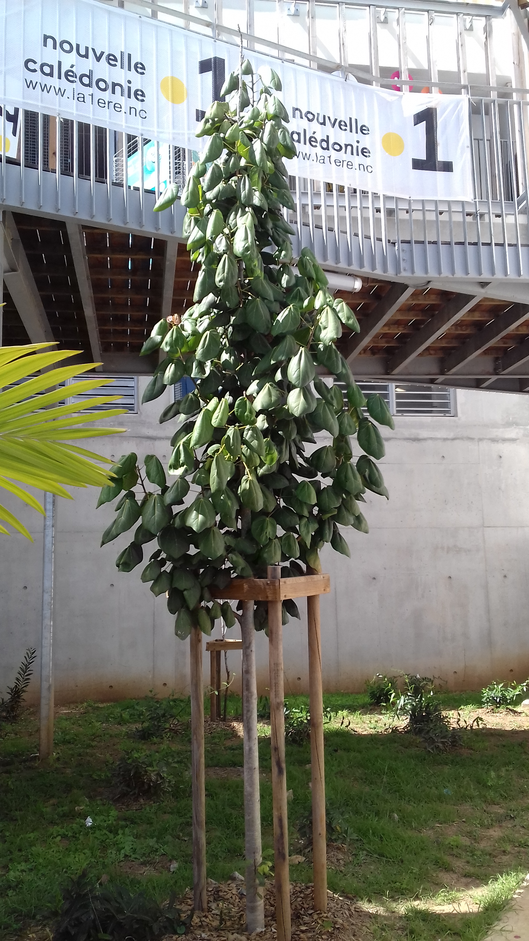 Acropogon bullatus, Université de Nouvelle-Calédonie, Nouméa. Photographié à l'occasion de Diginova 2019.